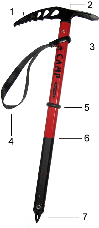 Ice axe